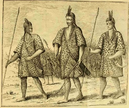 Representación de guerreros aborígenes Abipones pintados, tribu que habitaba antiguamente la provincia de Santiago del Estero, Argentina.